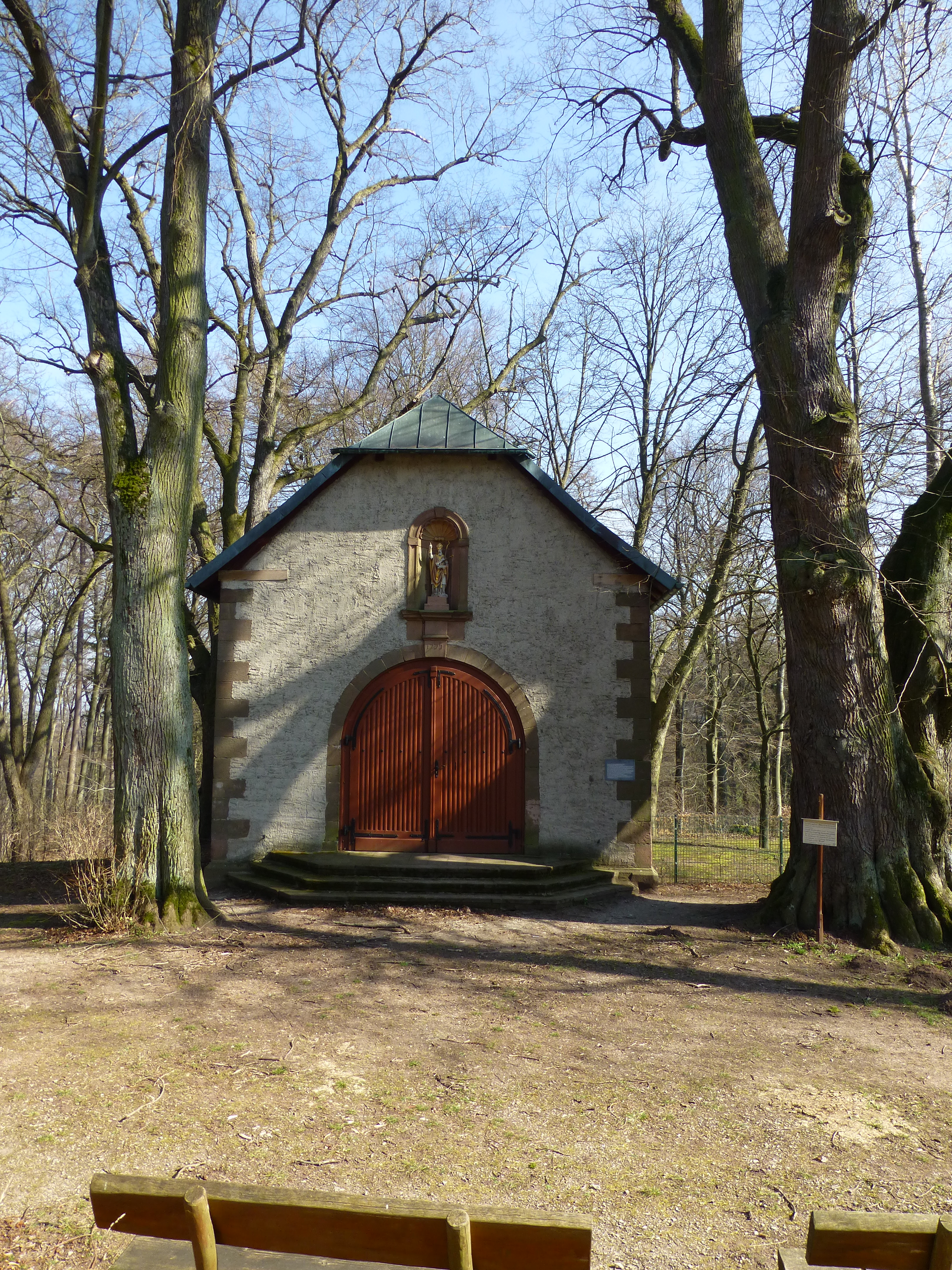 Die Alte Burg-Kapelle bei Heiligenstadt